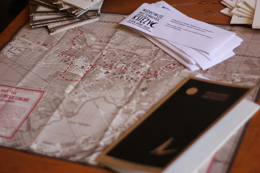 Folder "Spaceru z Czechowiczem". Cykliczne wydarzenie Ośrodka "Brama Grodzka - Teatru NN" odbyło się w lipcową pełnię księżyca, trasą "Poematu o mieście Lublinie".